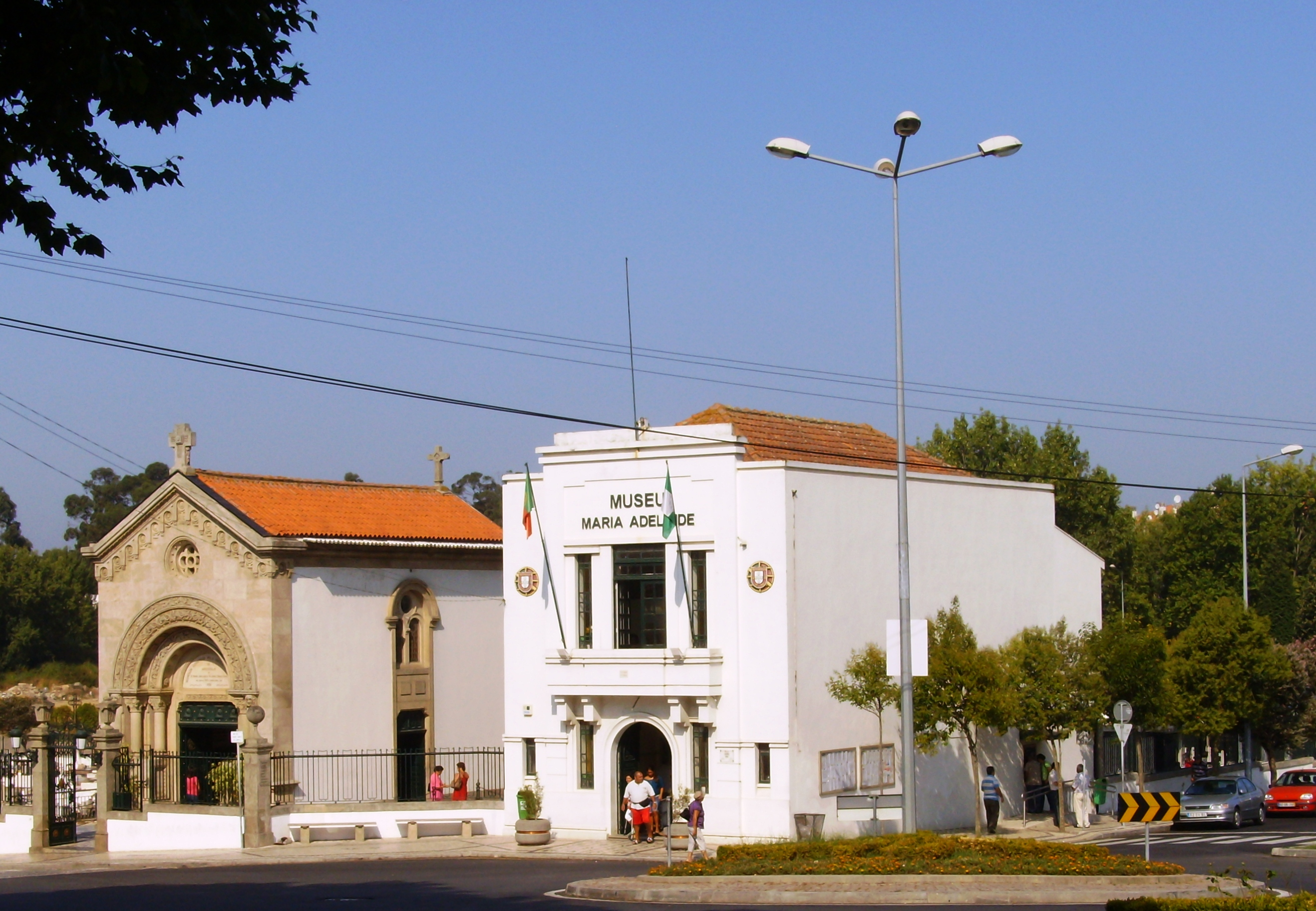 Capela-jazigo e Museu de D. Maria Adelaide de Sam José e Sousa, também referida como Santa Maria Adelaide e Santinha de Arcozelo, Arcozelo, Vila Nova de Gaia, distrito do Porto, Portugal.